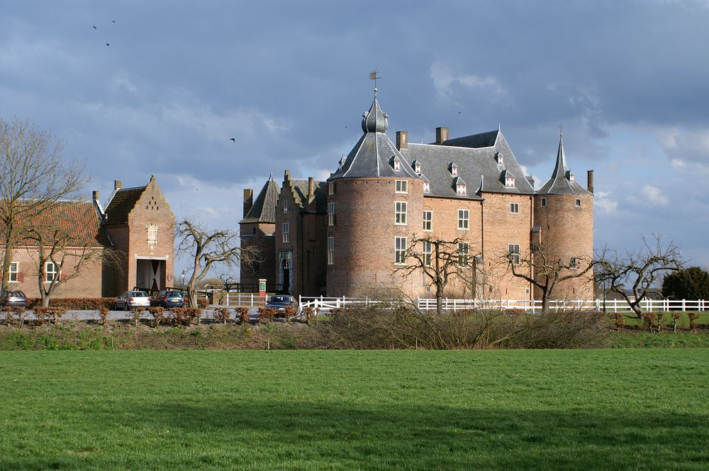 Kasteel Ammersoyen te Ammerzoden.